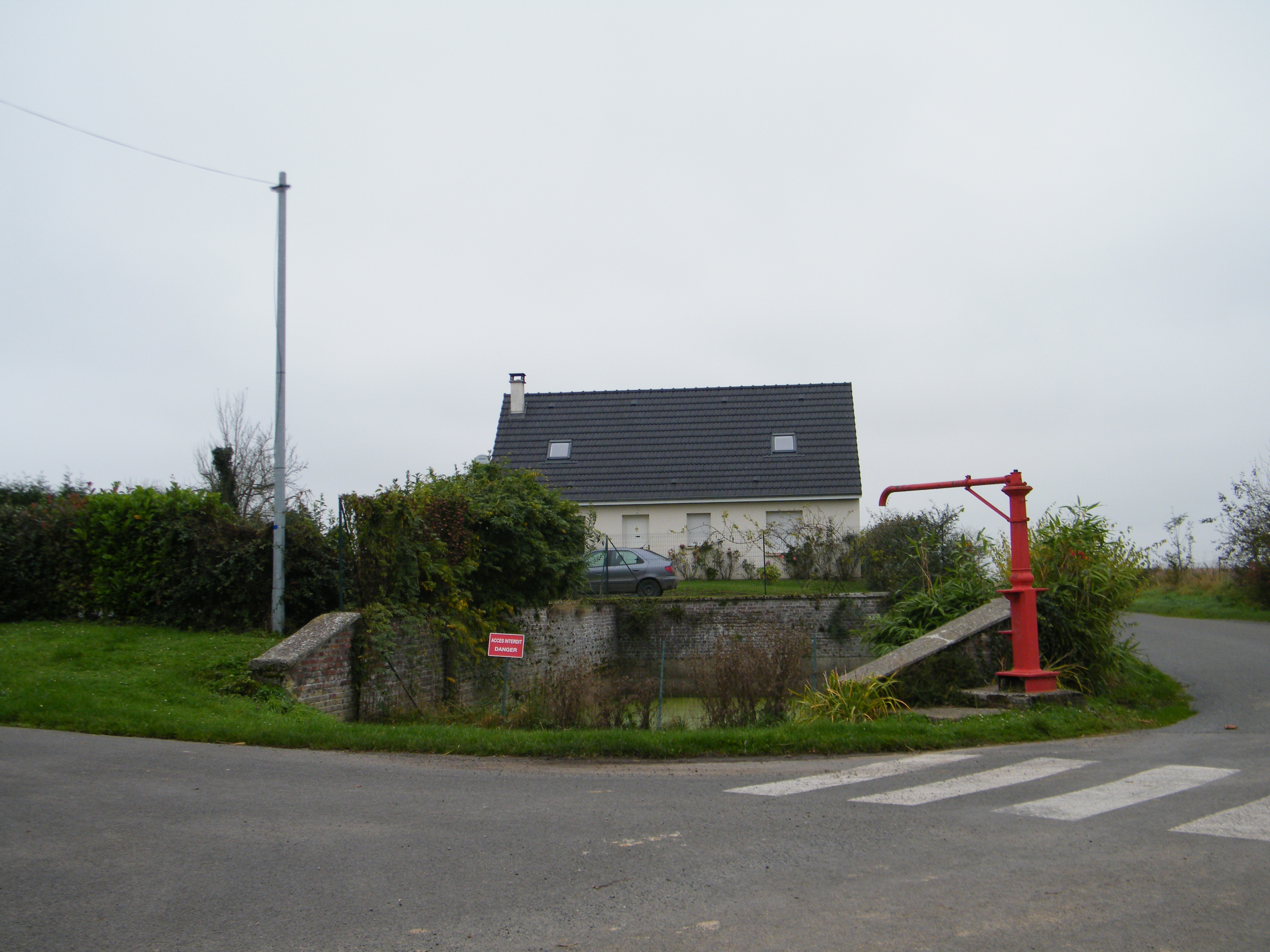 Mare.